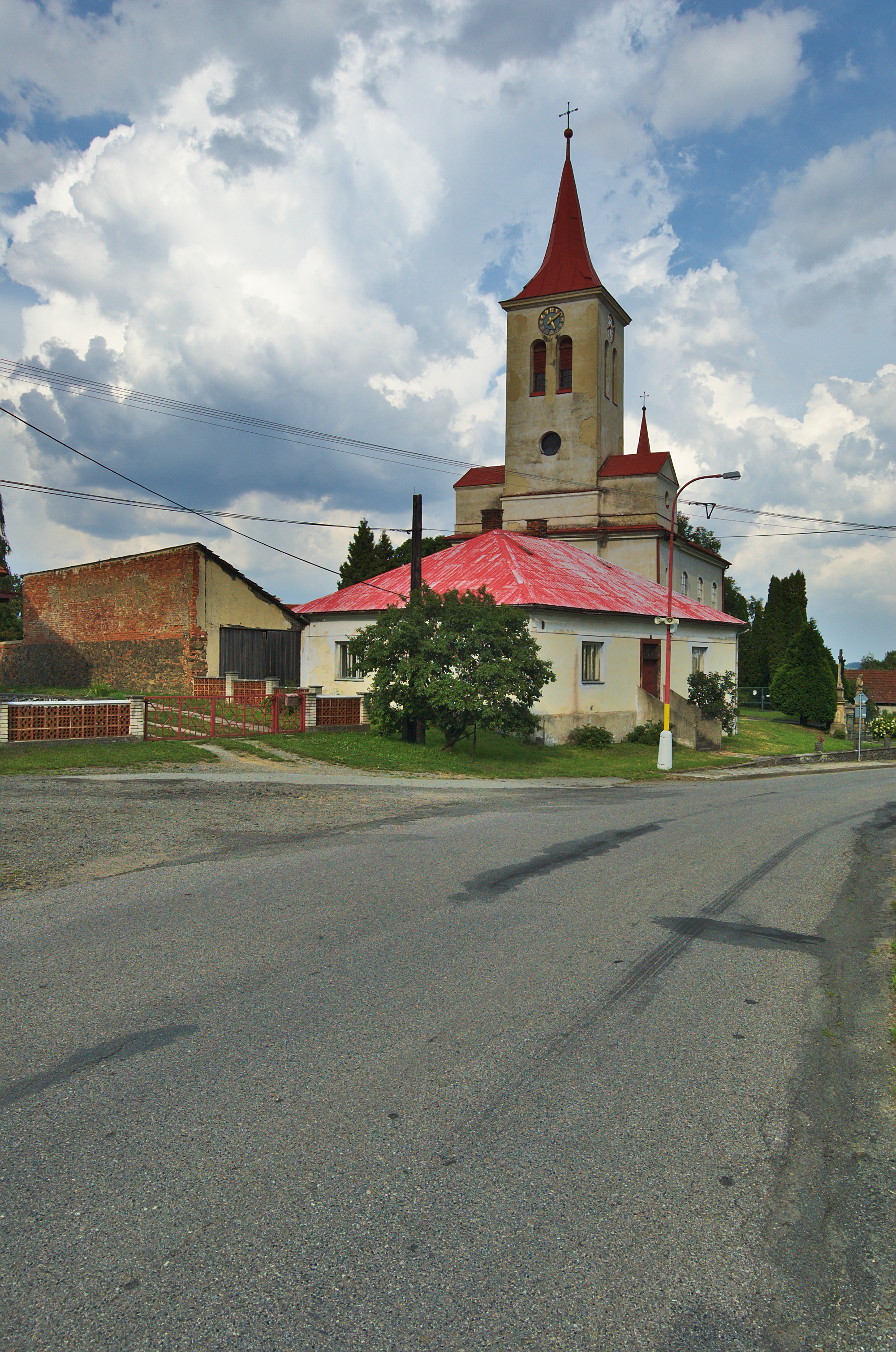 Kostel svatého Michaela, Rozstání, okres Prostějov